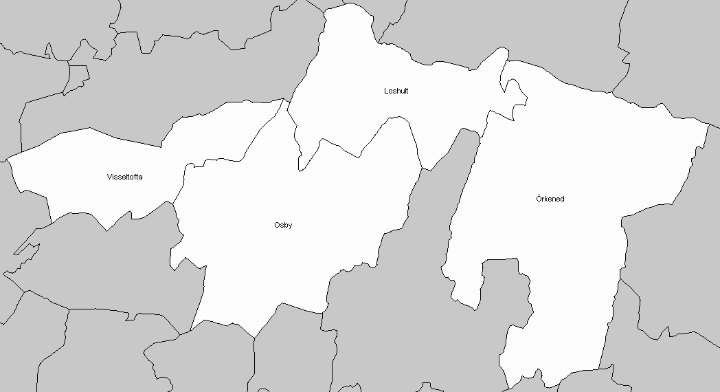 Socken in Osby